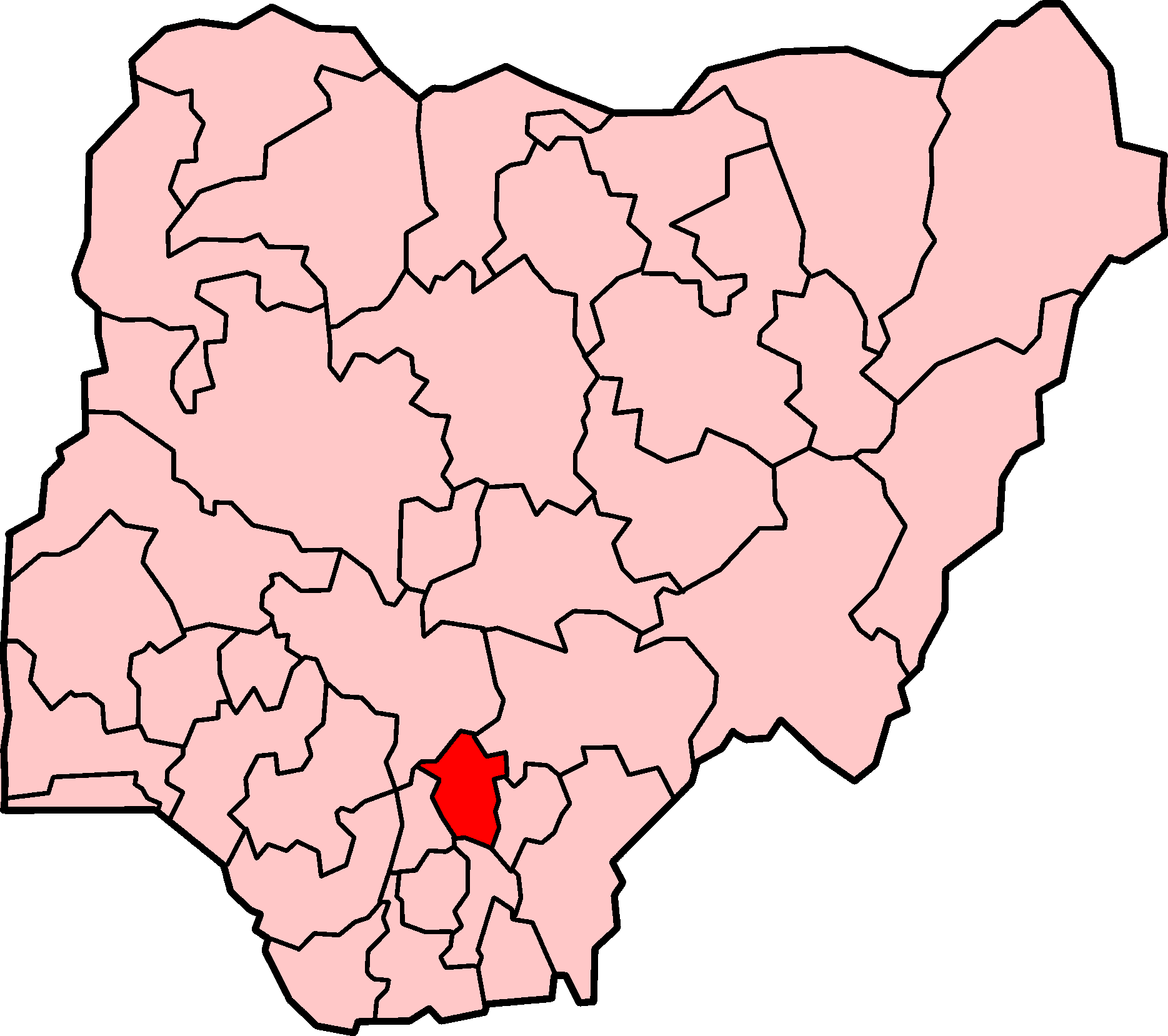 Localização do estado de Enugu na Nigéria.